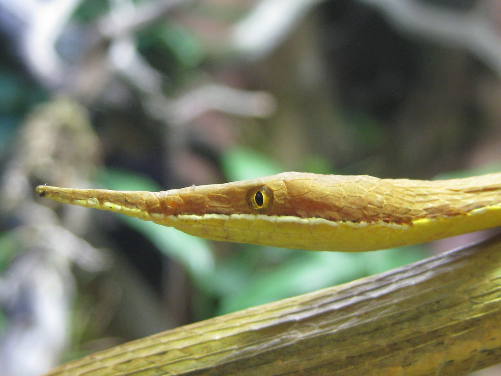 Blattnasennatter Langaha nasuta = Langaha madagascariensis, Männchen